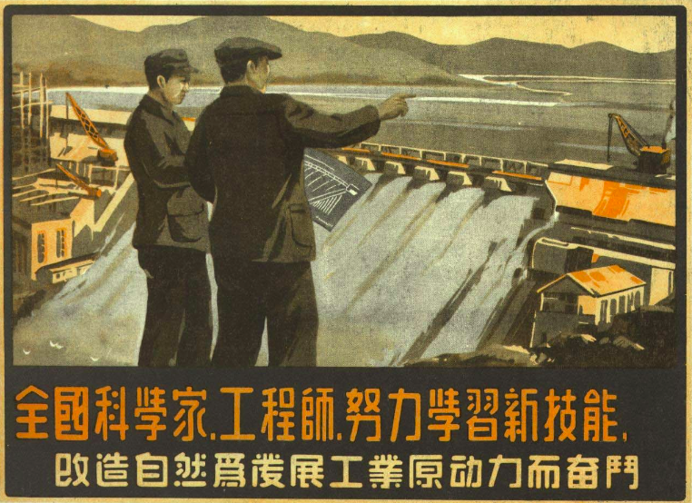 全国科学家、工程师努力学习新技能，1950年7月的《人民画报》。